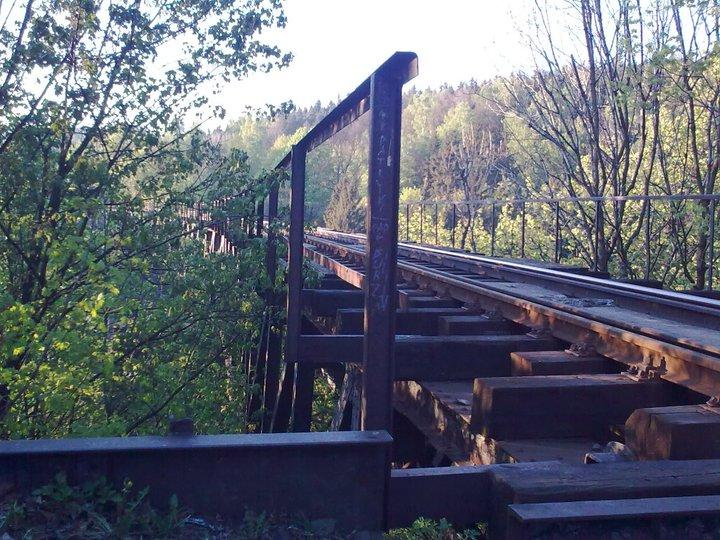 Wiadukt kolejowy w Nowej Rudzie